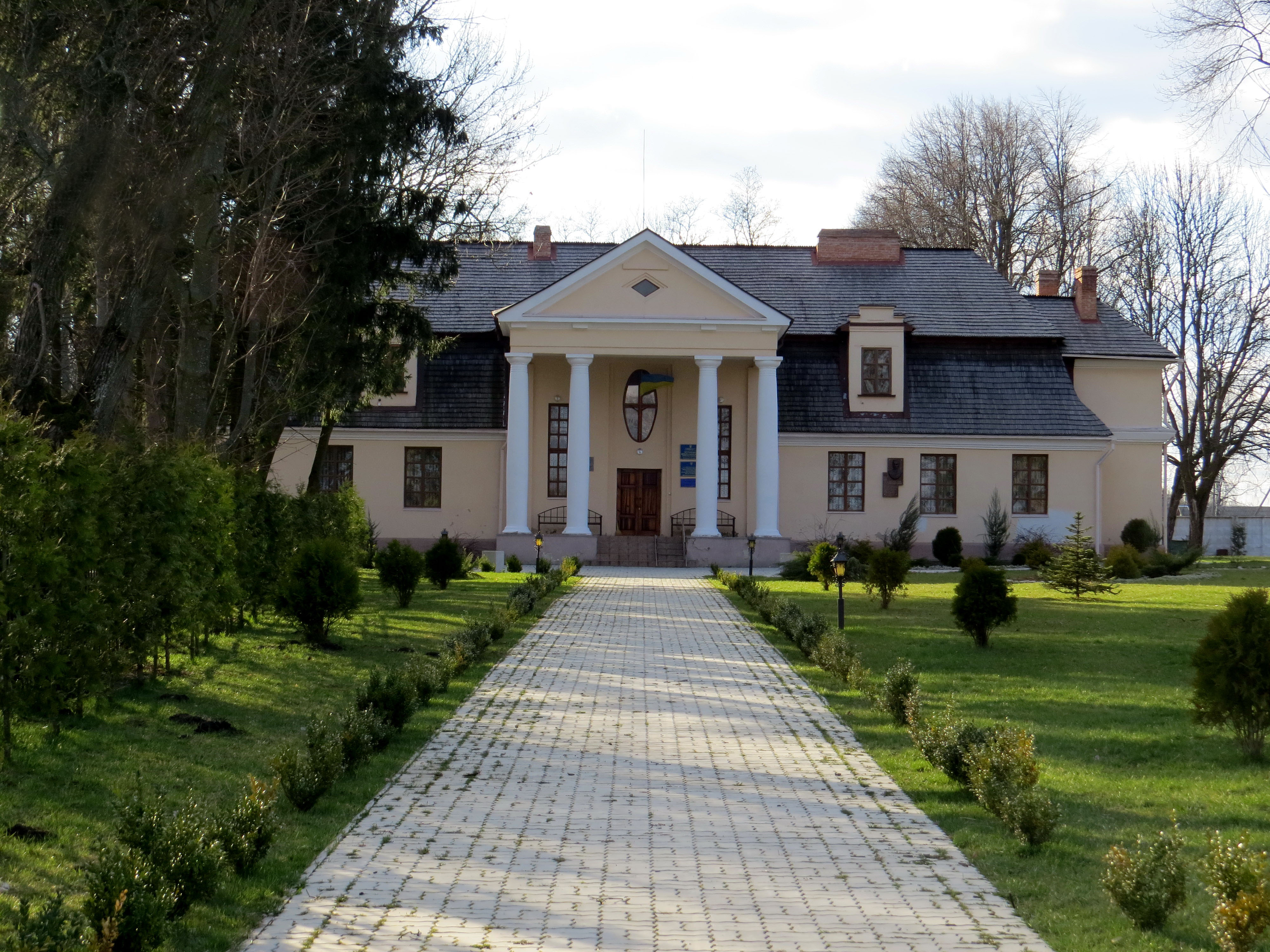 Палац родини Липинських (мур.) (поч. 19 ст. - 1882 рік) - передній вигляд - с.Затурці(вул. 1 Травня, 75) Локачинський район Волинська область Україна